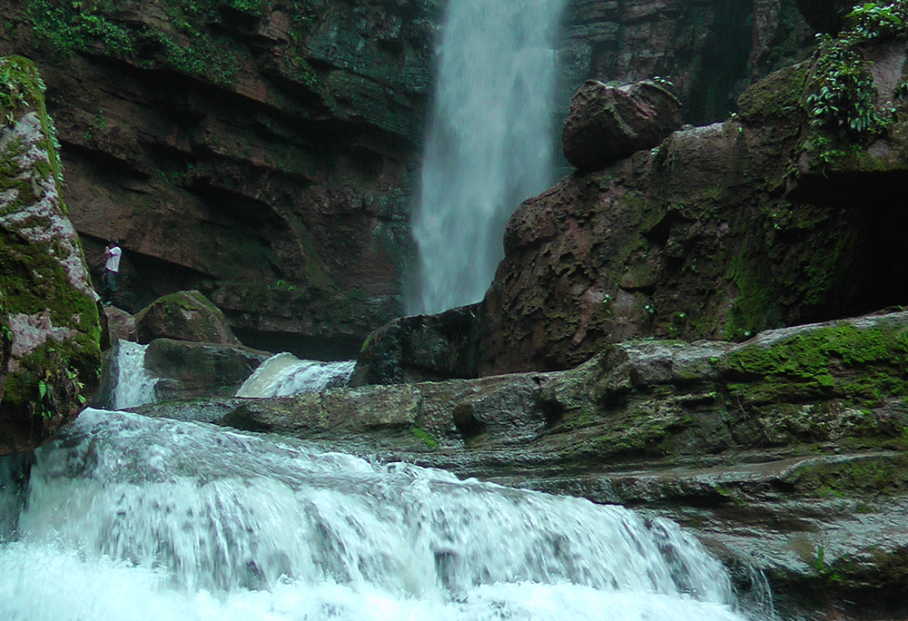 Catarata EL PAREDÓN